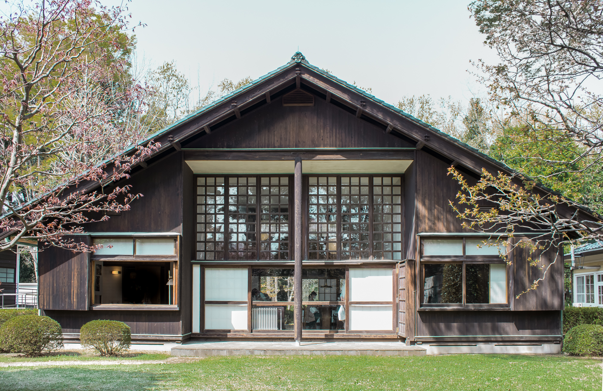 前川國男邸（1942）。 東京都指定有形文化財。